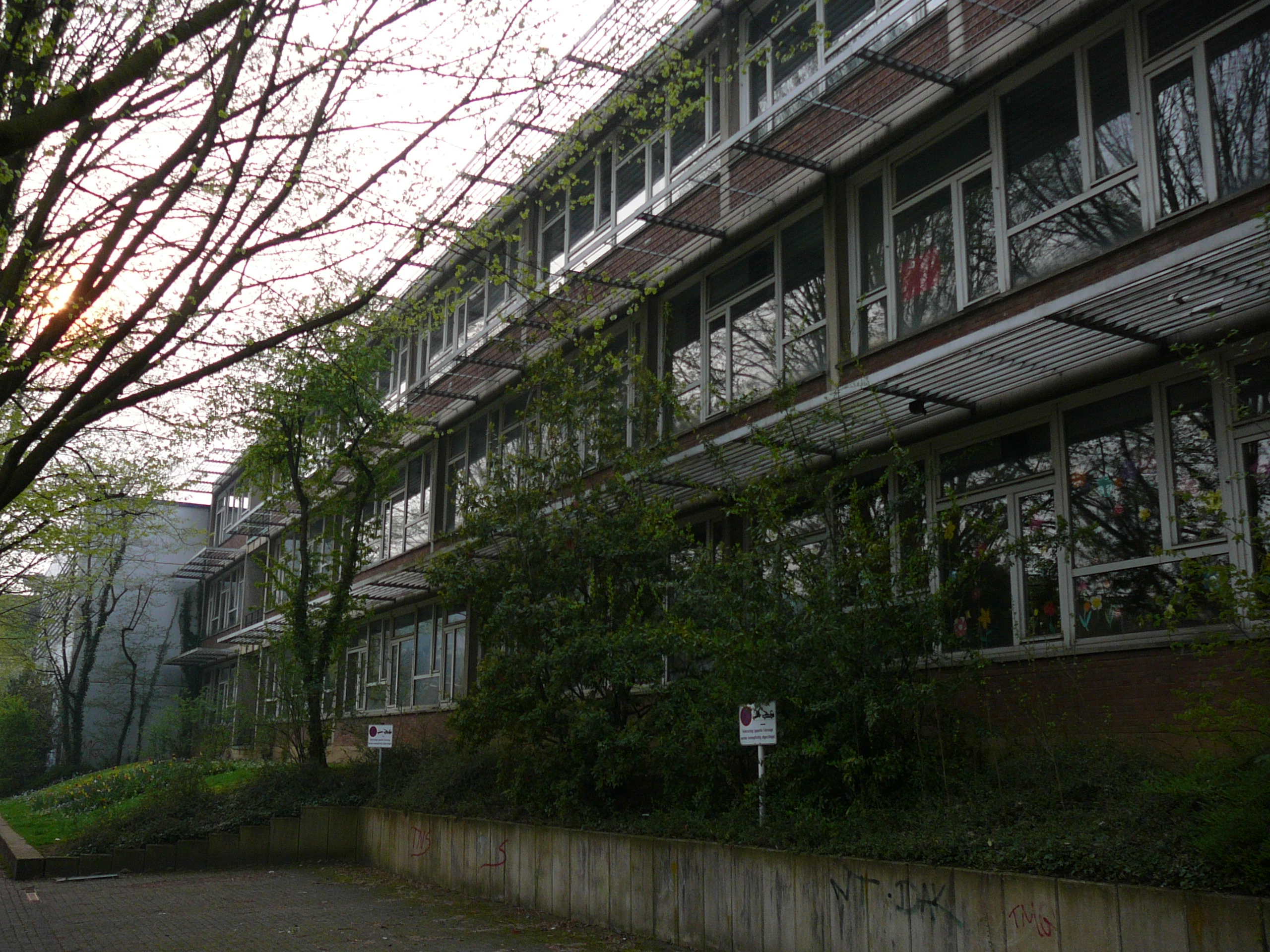 Richard-Wagner-Straße, Wuppertal